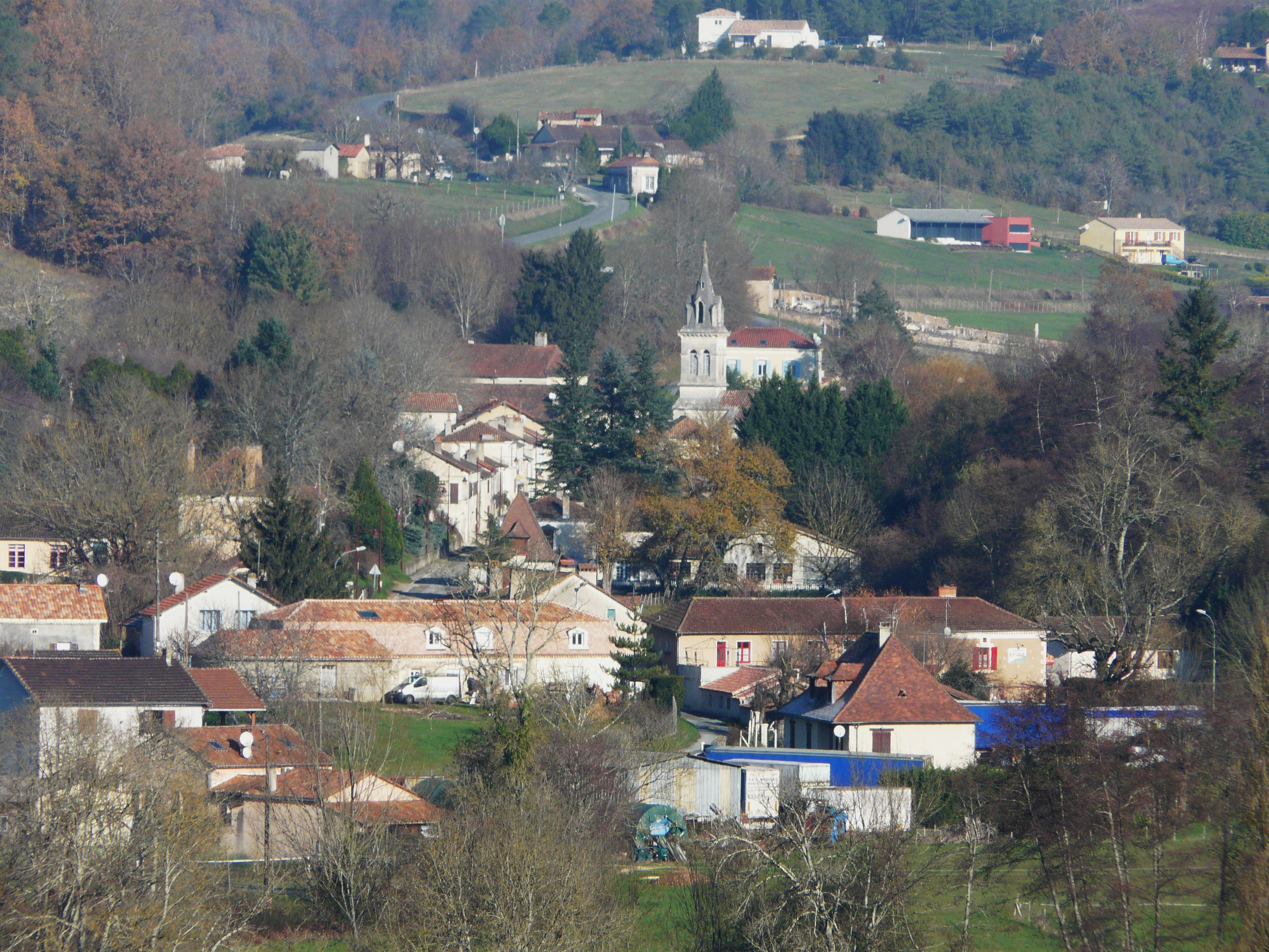 Le village de Manzac-sur-Vern, Dordogne, France.